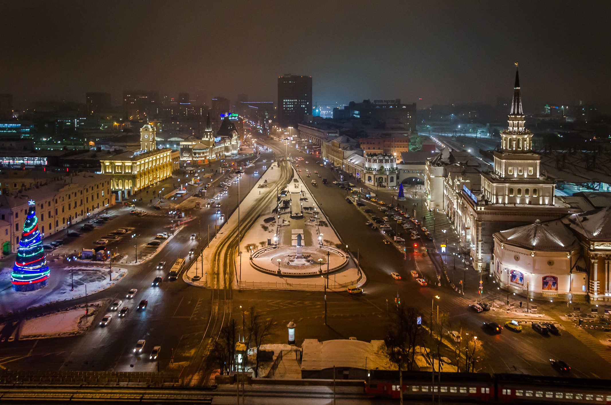 Komsomolskaya square as seen from Leningradskaya hotel in winter (2014) // Ночной вид на Комсомольскую площадь из гостиницы Ленинградская (2014)